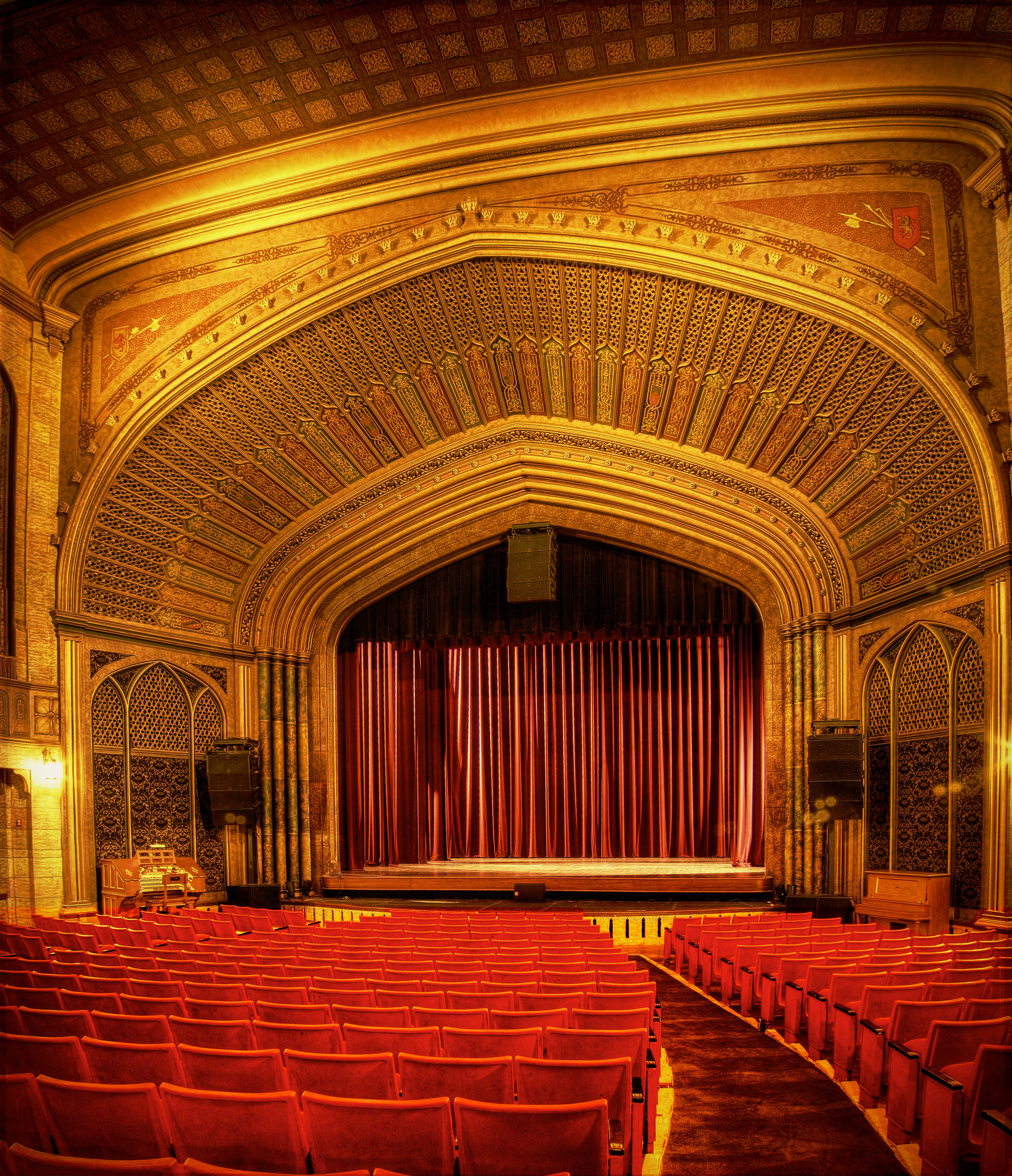 9-exposure vertical HDR panorama